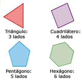 es un poli